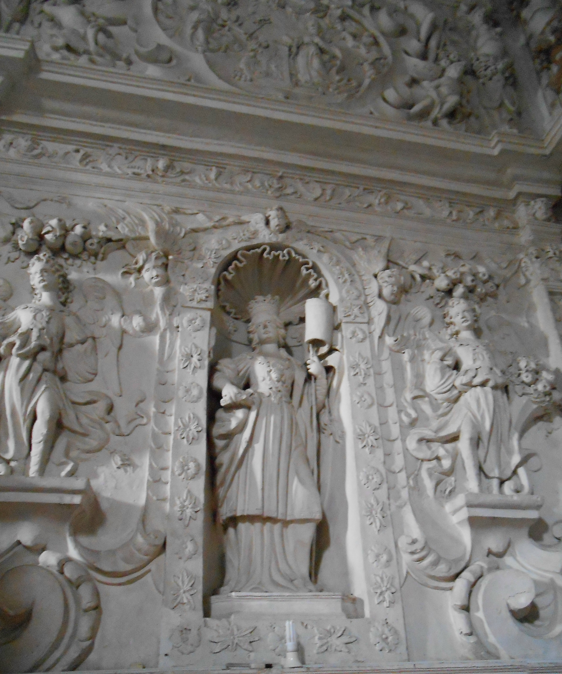 Statua di S. Orsola presso la chiesa della Madonna della Catena, sec. XVII.